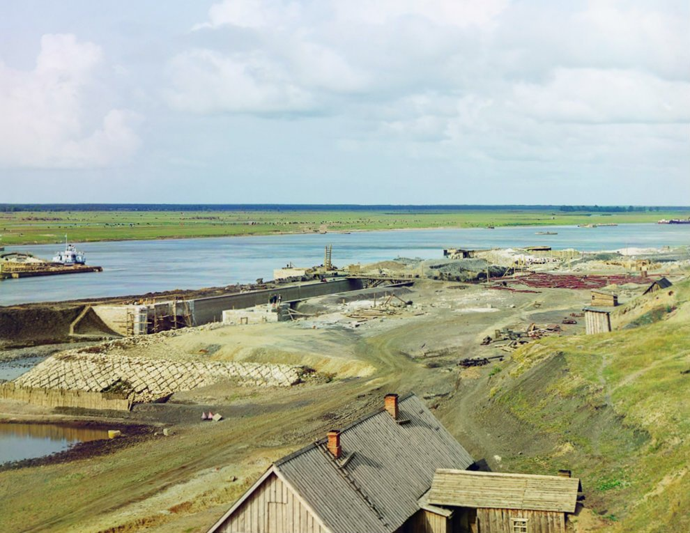 Село Кузьминское, Рыбновский район